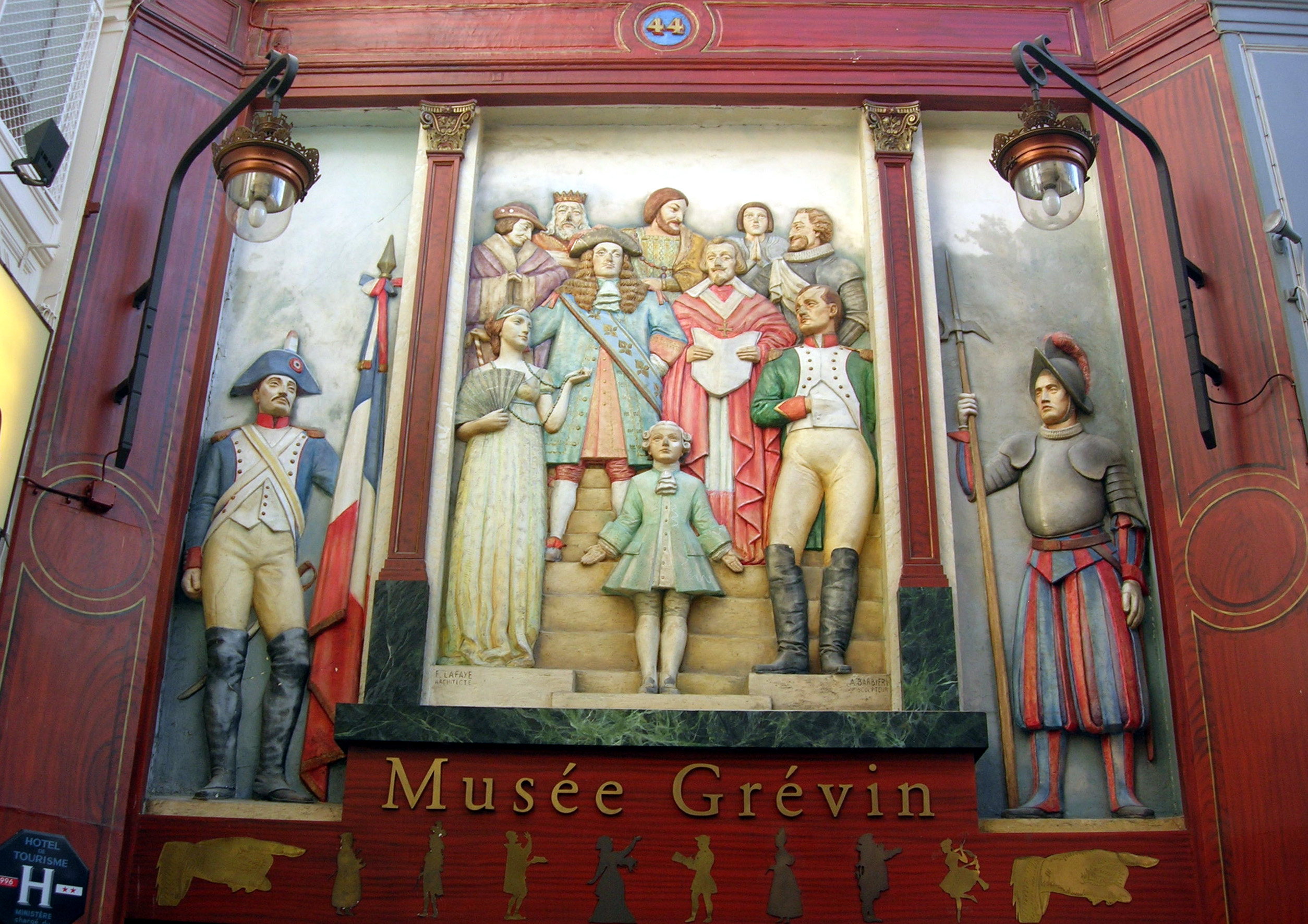 Au dessus de la porte d'accès du musée Grévin, passage Jouffroy